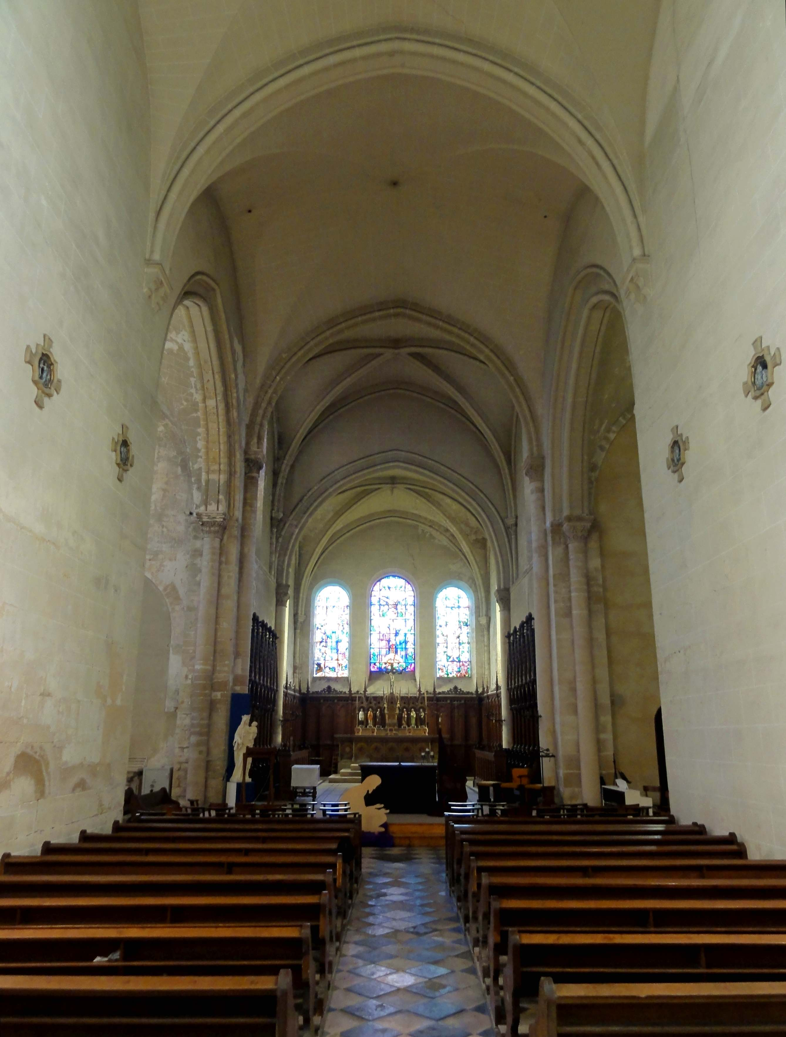 Voir titre.